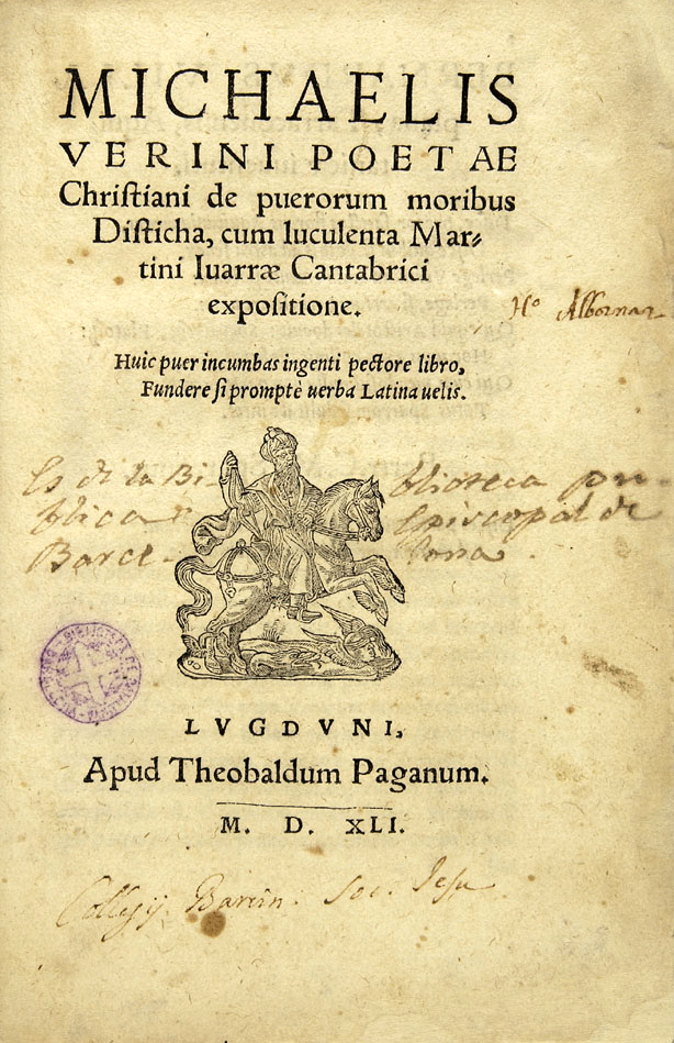 Michele Verino, De Puerorum Moribus Disticha